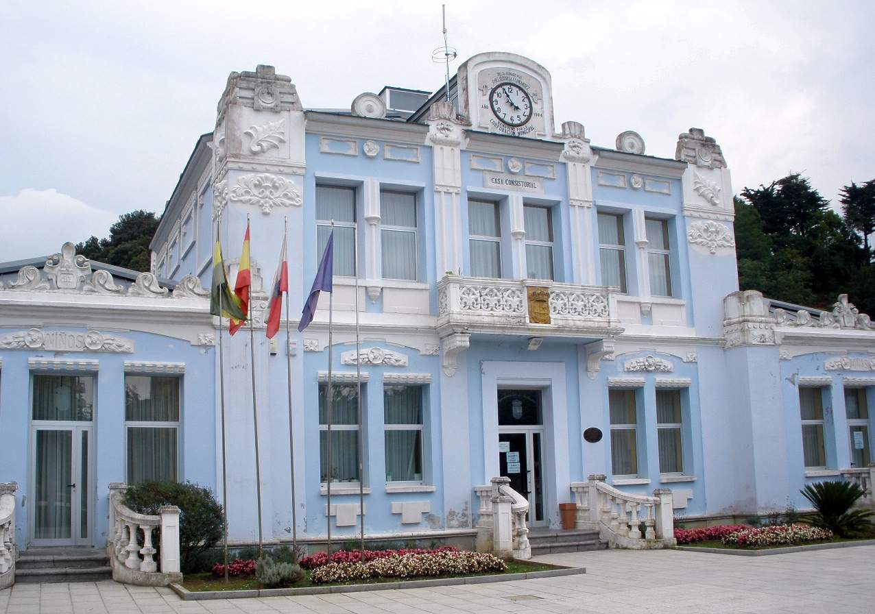 Colindres (Cantabria) - Ayuntamiento